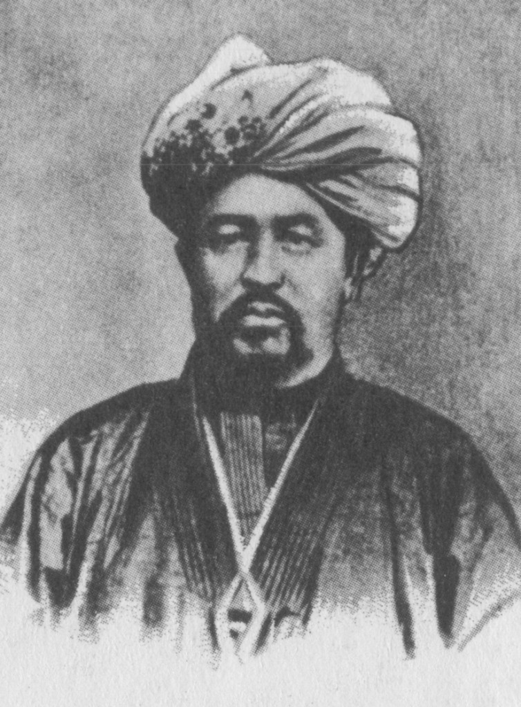 Şihabetdin Märcani